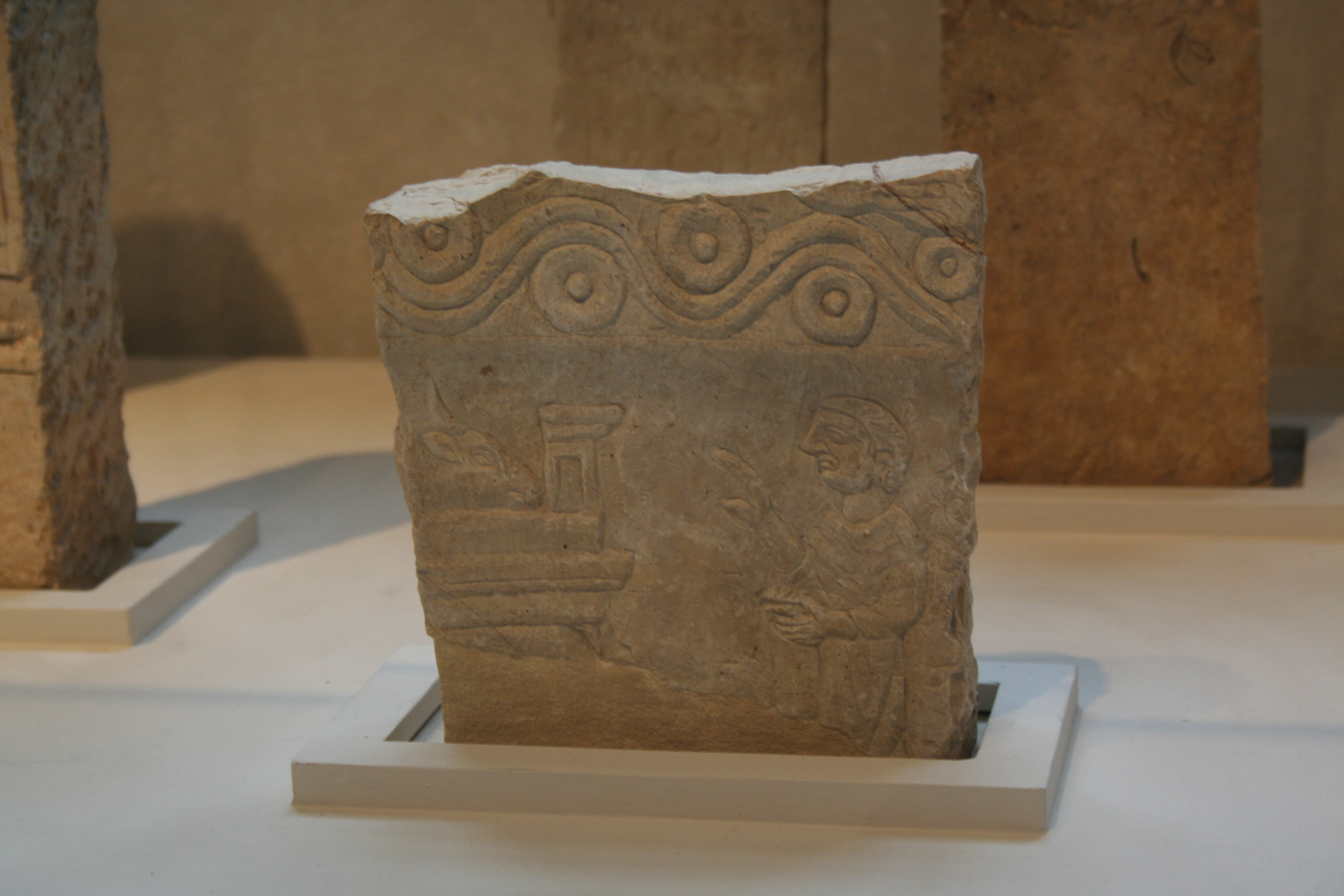 Stèle votive IIe siècle avant J.-C. Carthage, Tunisie. Calcaire (AO 5081). (Scène avec une scène religieuse : prêtre ou fidèle face à un autel au-dessus duquel se trouve une tête de bovin; oeuvre provenant de Carthage) louvre.fr